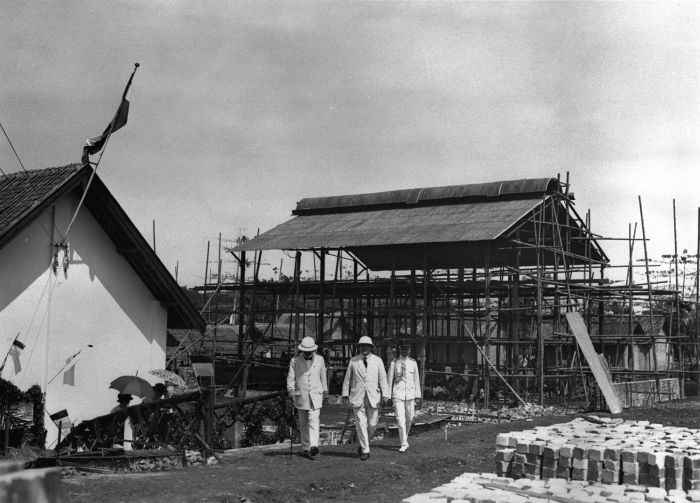 Foto. Bezoek van Gouverneur-Generaal mr. D. Fock aan de Pamanoekan- en Tjiasemlanden op 27 en 28 oktober 1922; de koffie-onderneming Pasir Boengoer, West-Java.